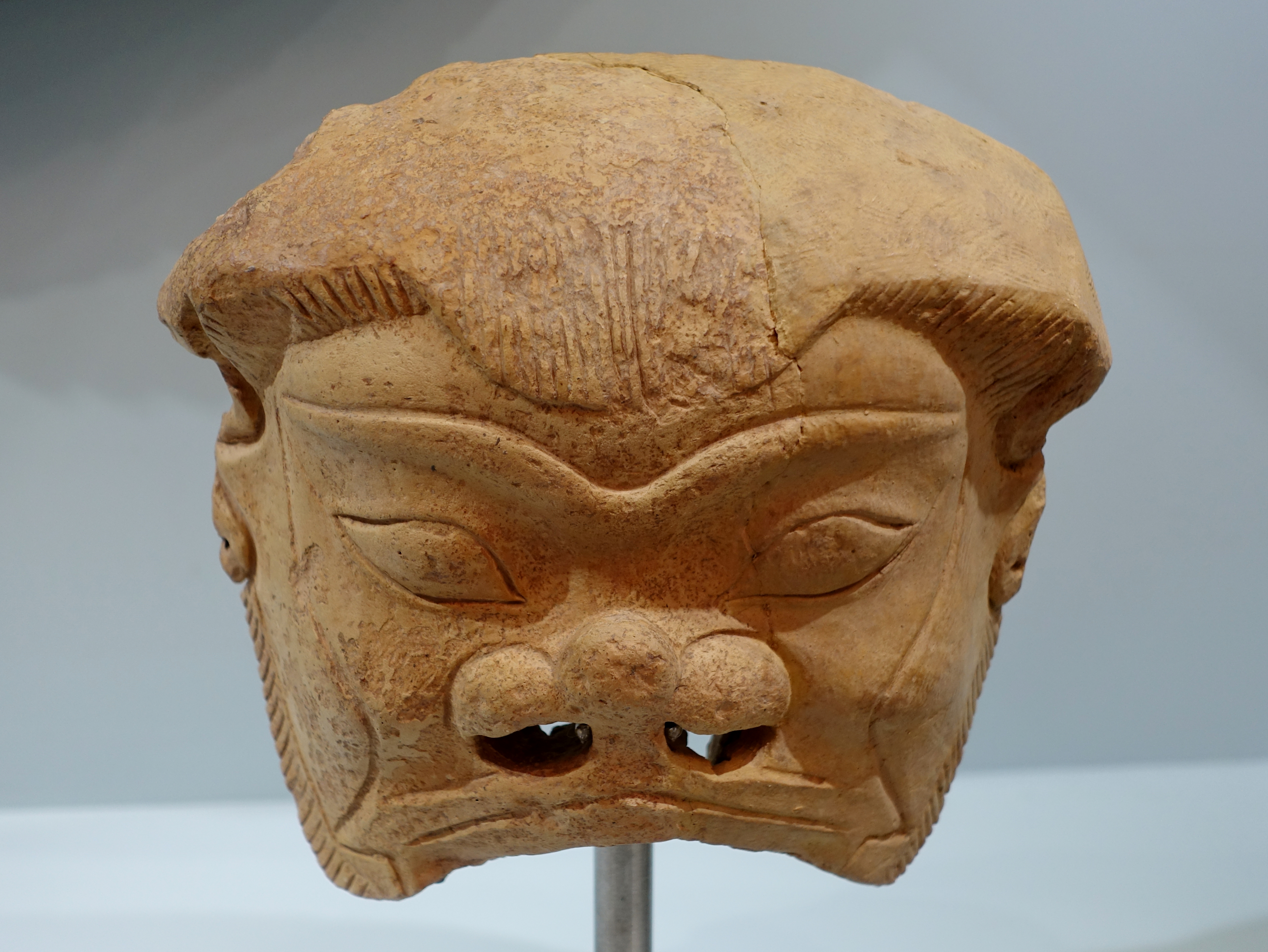 Terrakottamaske der Medusa vom Tempel des Diktäischen Zeus (archaische bis klassische Periode, 6.–5. Jahrhundert v. Chr.) aus der Ausgrabungsstätte von Roussolakkos, Archäologisches Museum von Iraklio, Kreta, Griechenland